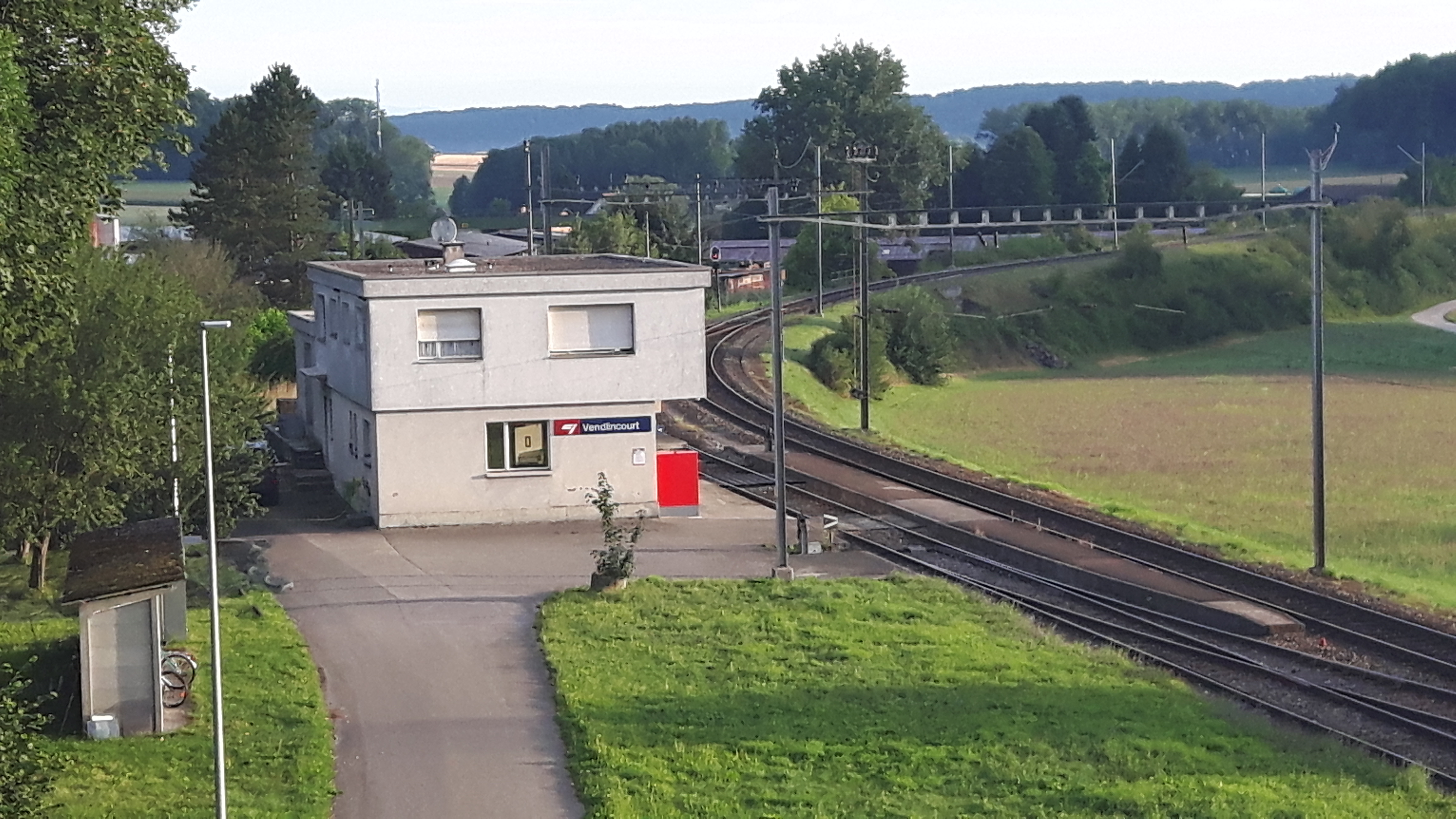 Bahnhof von Vendlincourt